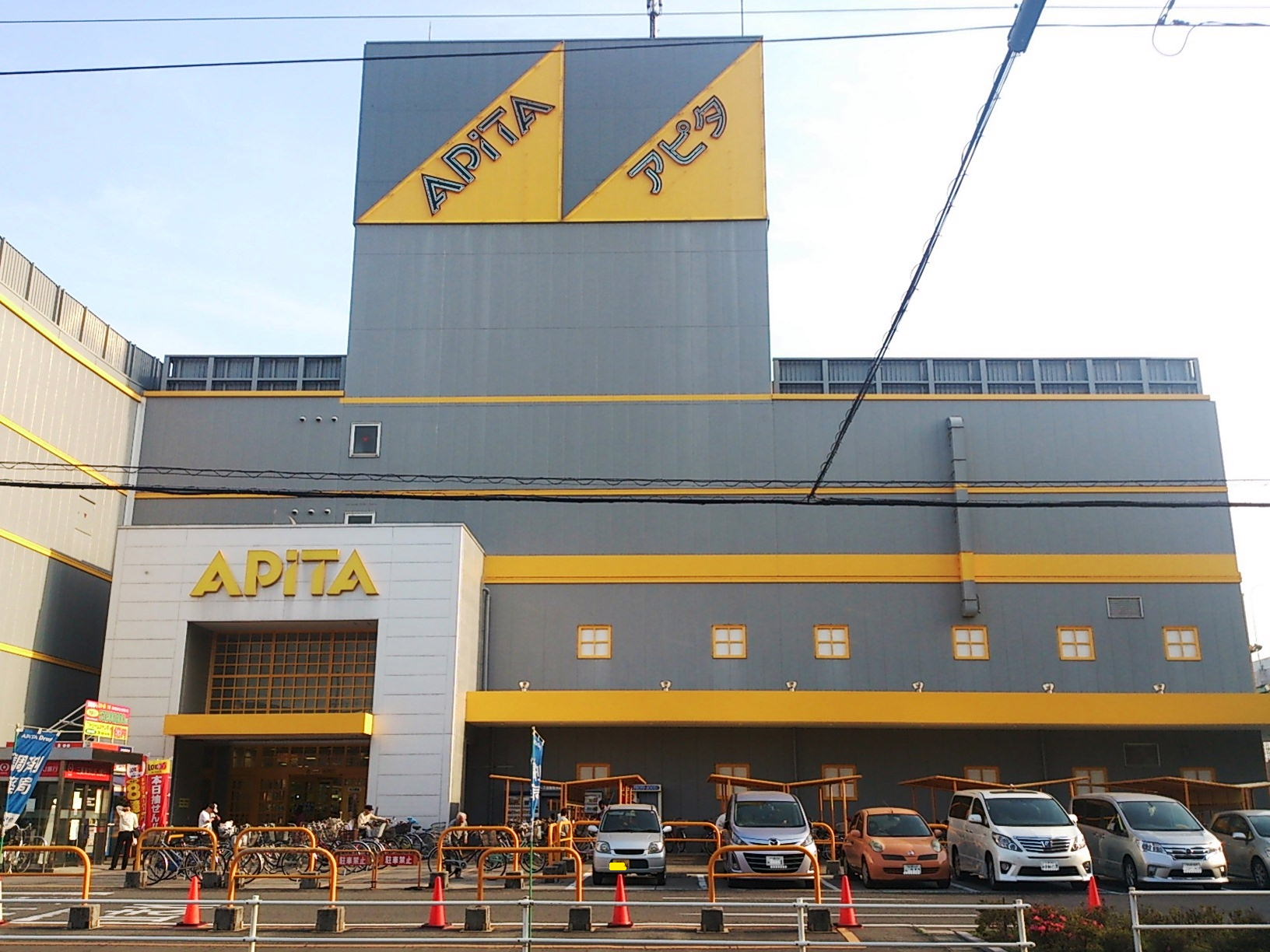 アピタ東海通店